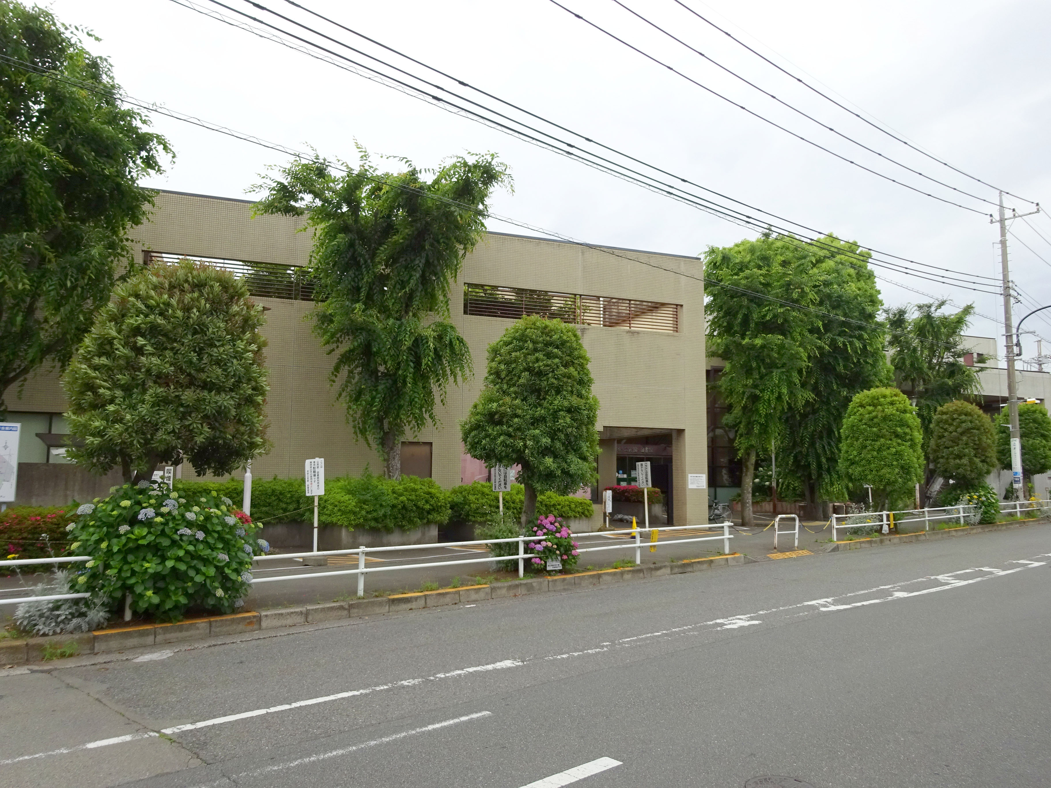 国分寺市本多図書館